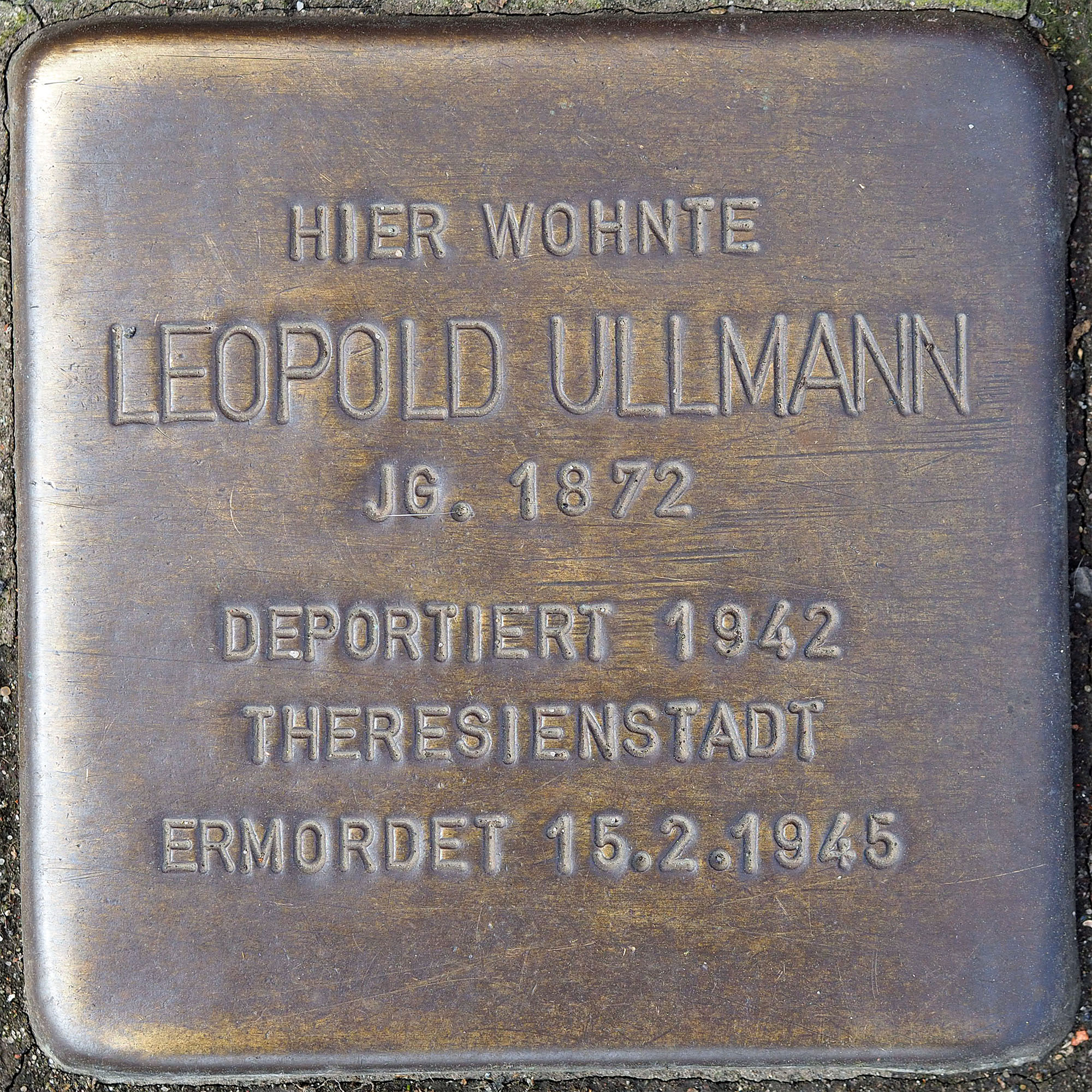 Stolpersteine Korschenbroich: Ullmann, Leopold